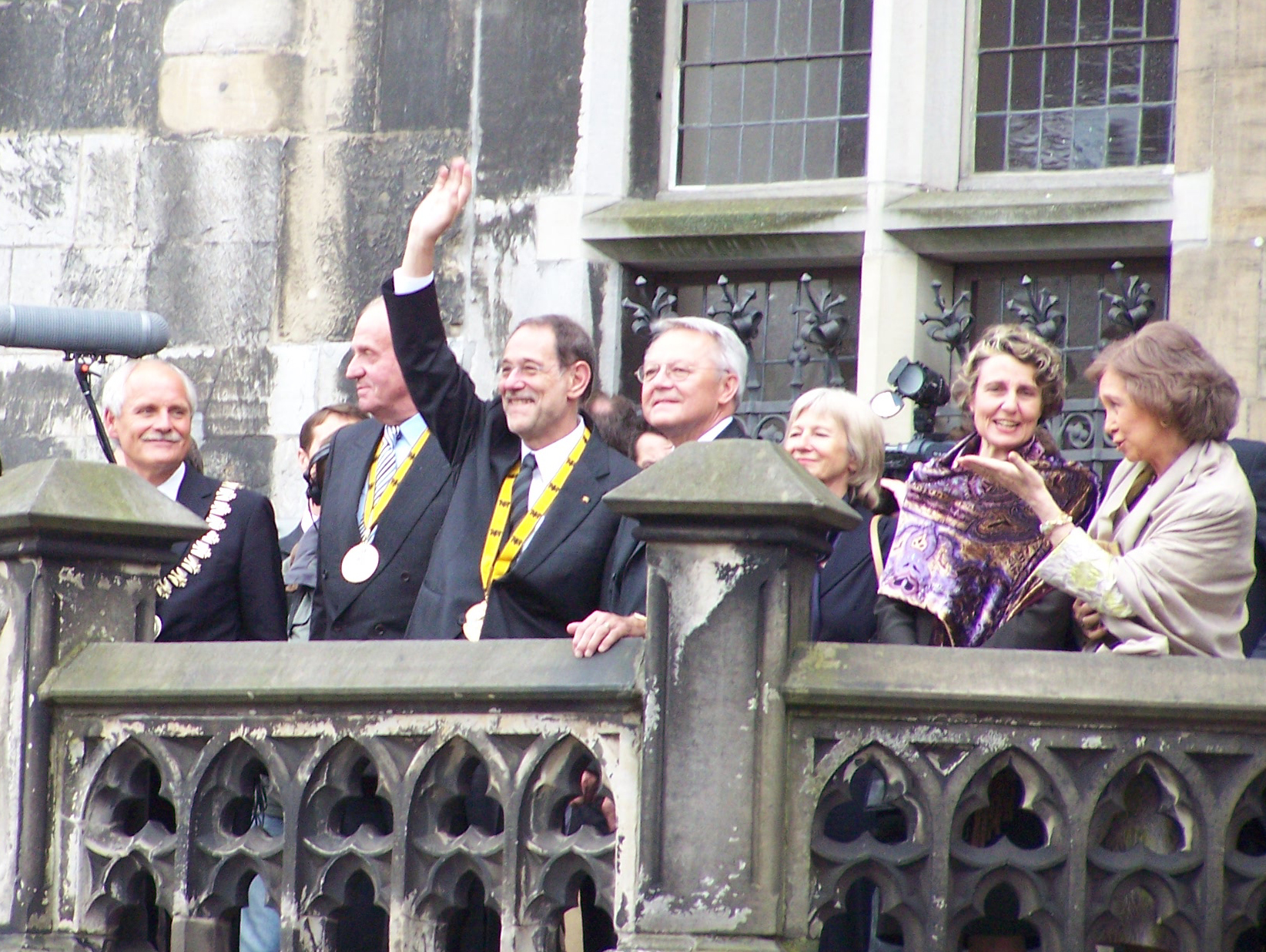 Karlspreis, Aachen. Jürgen Linden, Juan Carlos I de Espanha, Javier Solana, Rainha Sofía de Espanha à saída da Câmara Municipal, após a entrega do prémio a Javier Solana.